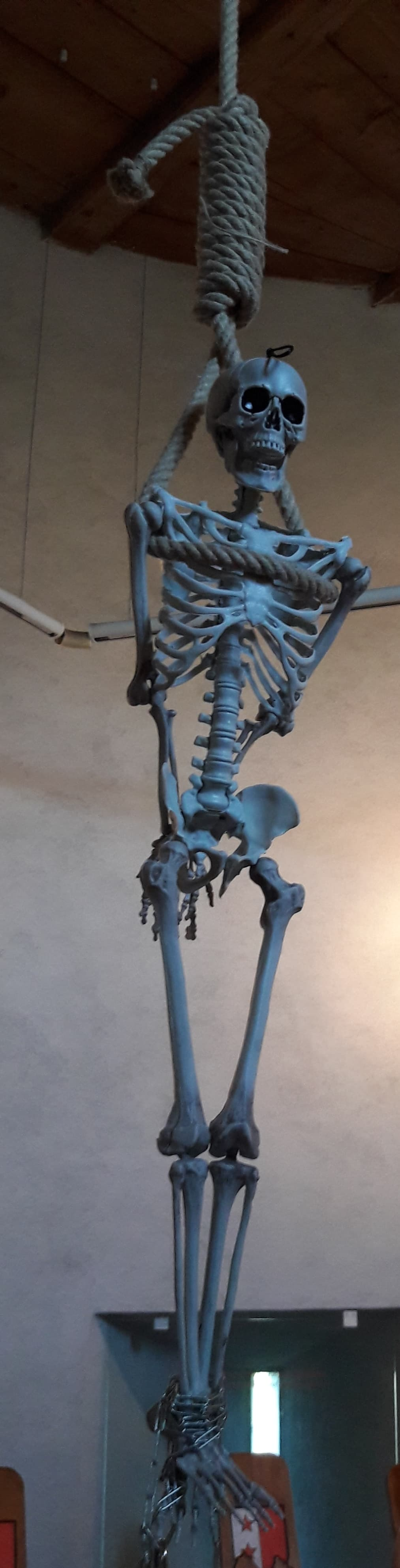 Atelier Valaisannes remarquables/week end sorcièresq